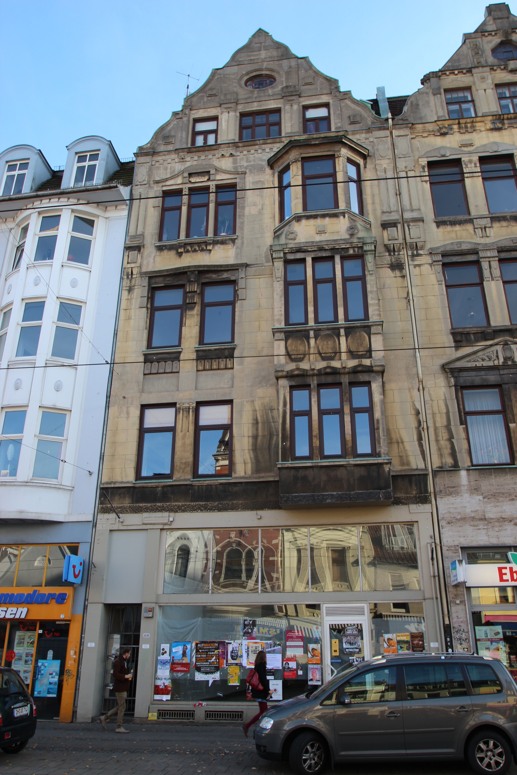 Wohnhaus in Bremen, Ostertorsteinweg 88Das abgebildete Objekt ist ein geschütztes Kulturdenkmal in der Freien Hansestadt Bremen, mit der Nr. 0978 beim Landesamt für Denkmalpflege registriert.